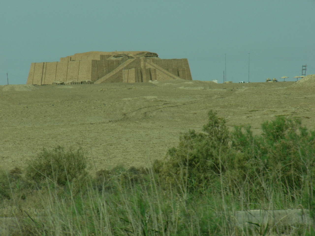 Fotografie de la distanță a ziguratului din Ur.